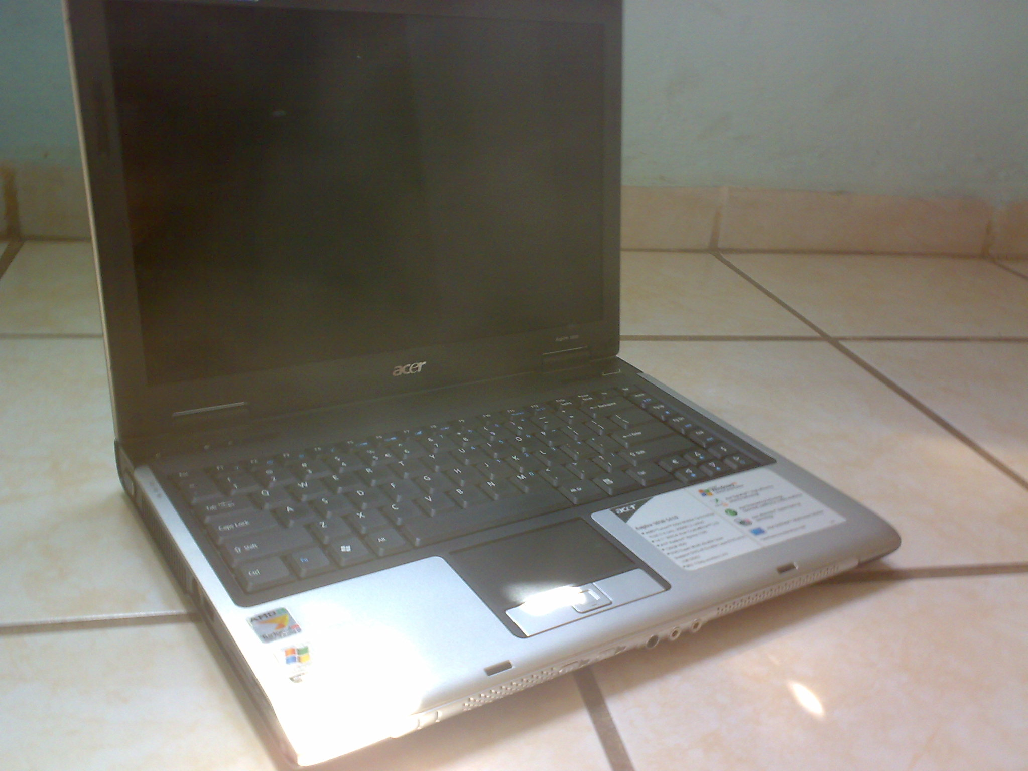 Acer Aspire laptop